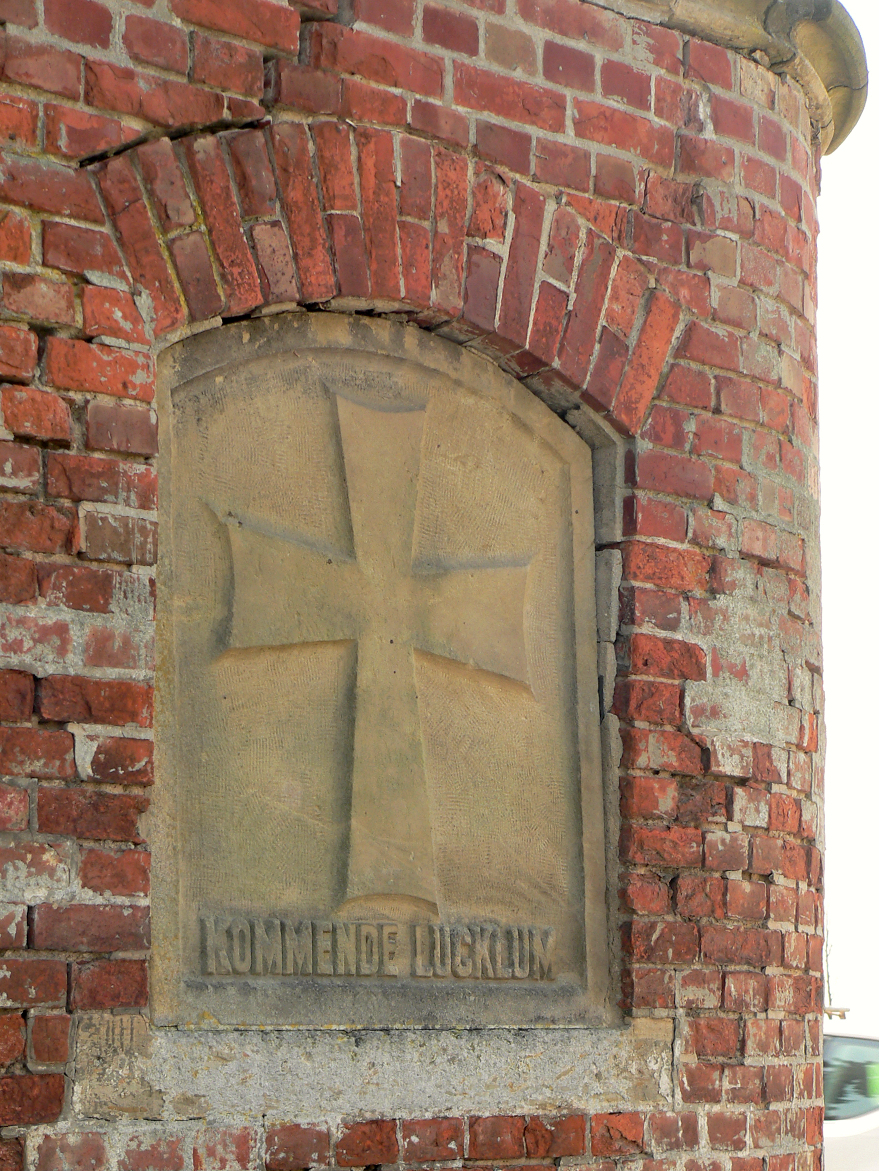 Steinrelief an einer Einfahrt des Ritterguts Lucklum